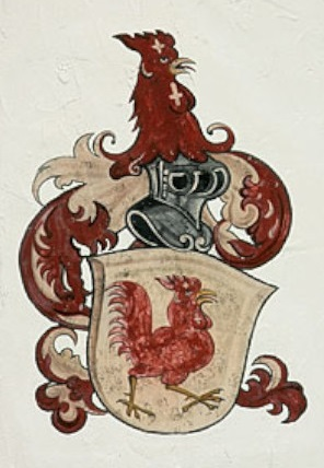 Wappen der Familie von Blarer